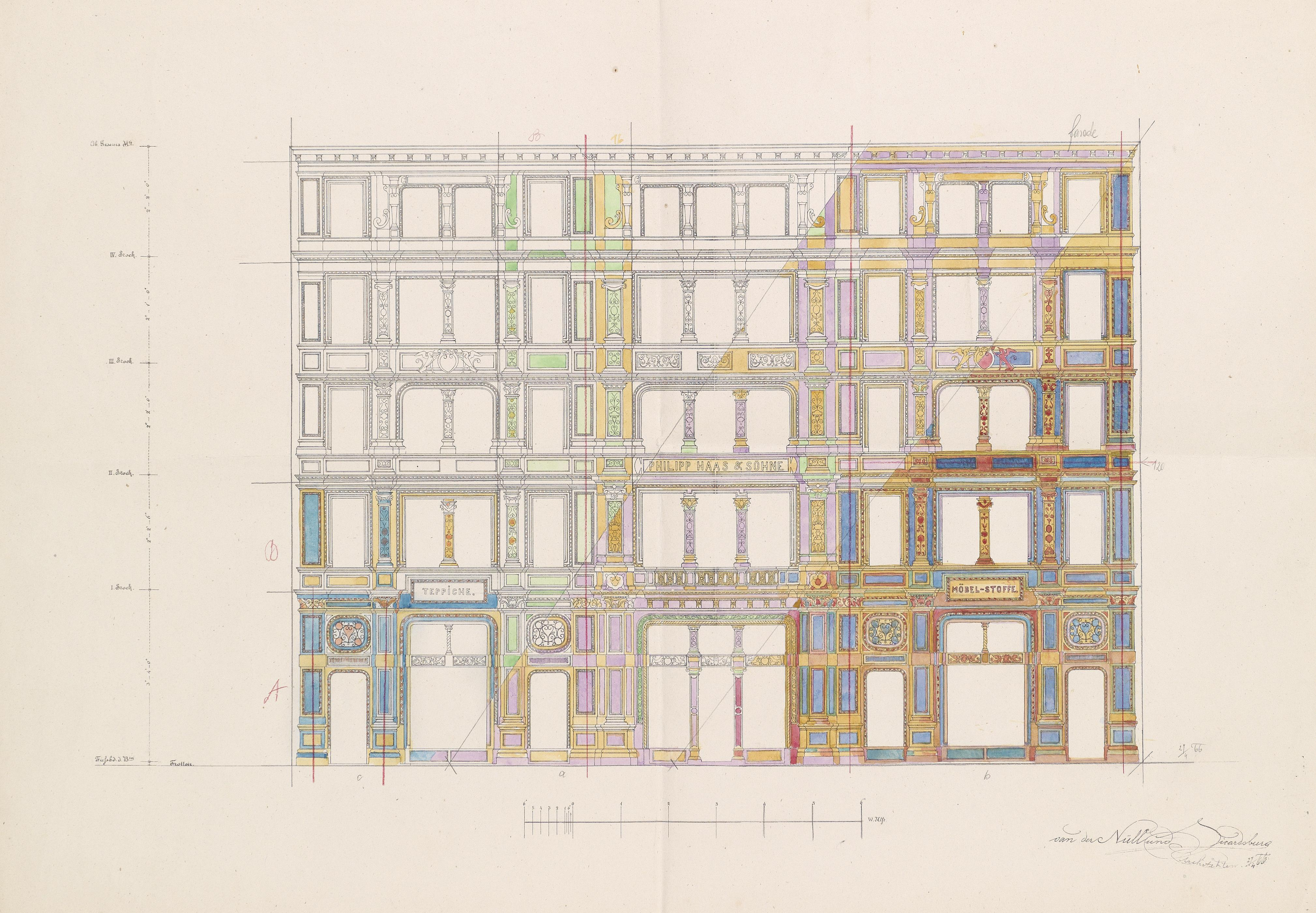 Architektonischer Entwurf zum Kaufhaus Philipp Haas & Söhne, Aufriss der Fassade, signiert und datiert "van der Nüll und Sicardsburg, Architekten 27. 4. (18)66", aquarellierte Federzeichnung auf Papier, 55 x 76 cm